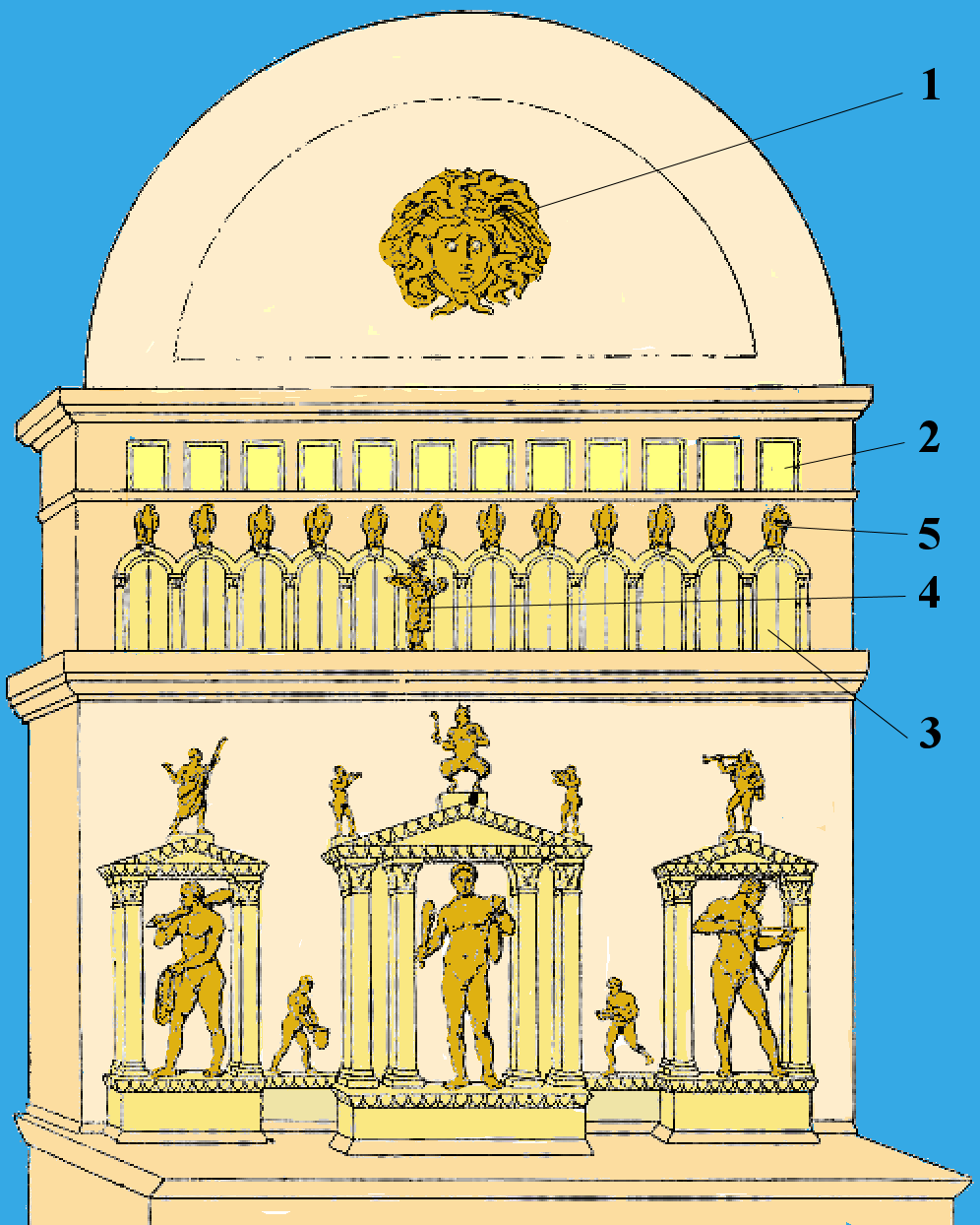 Reconstitution de la façade de l'horloge datée des années 500, d'après une description de Procope.